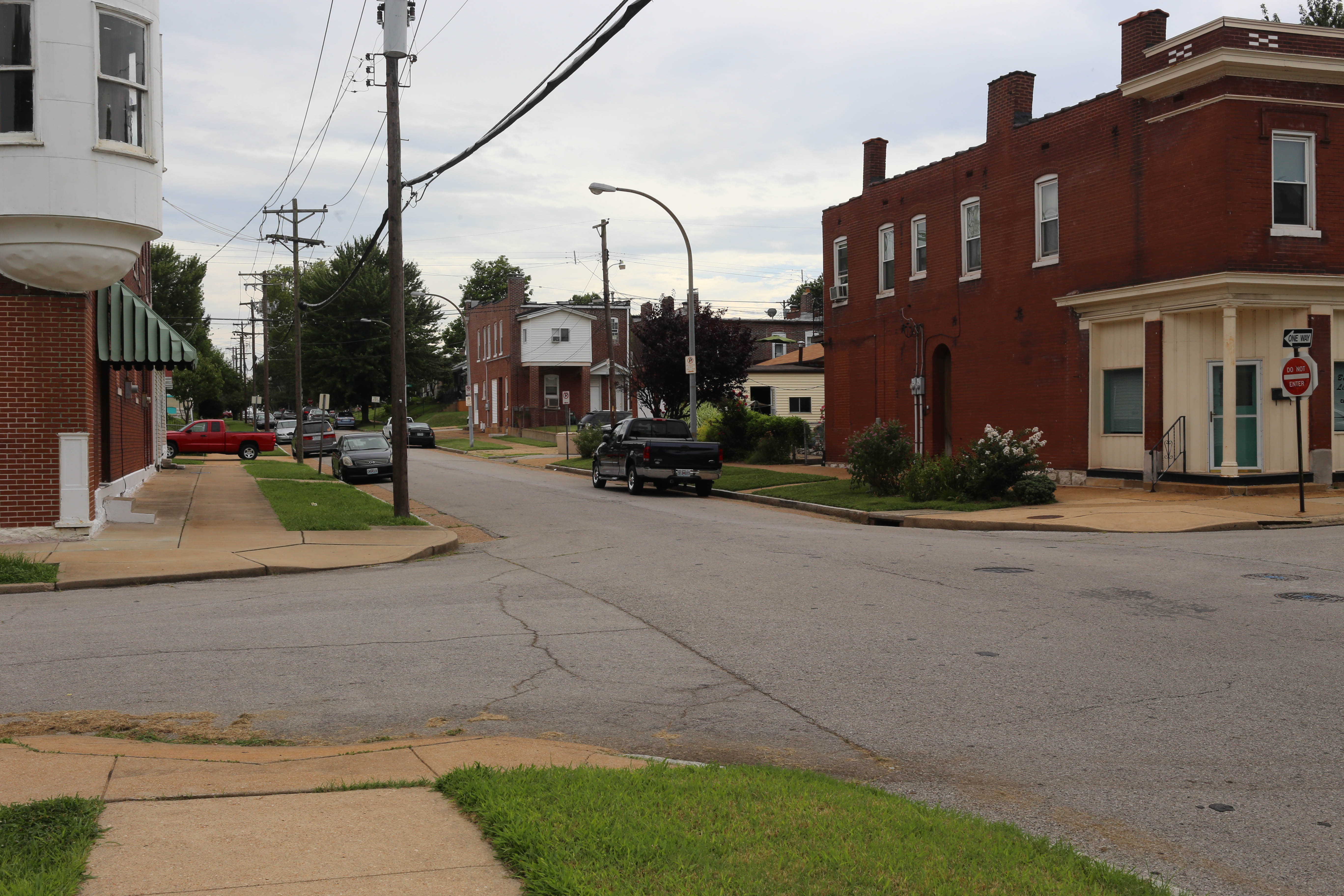 Boulevard Heights